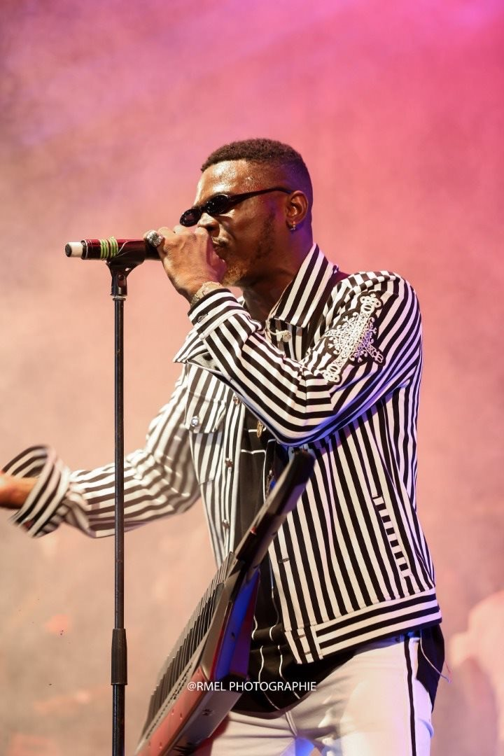 Concert Live (Anitché) 01-10-2019, Palais de la Culture Abidjan